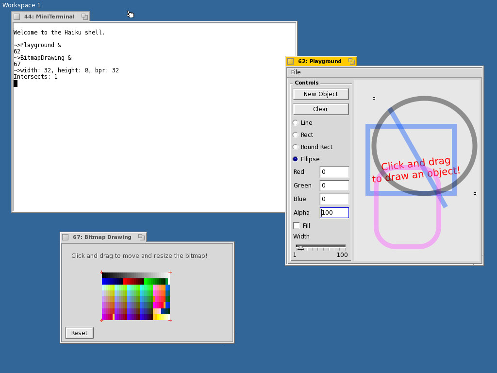 Screenshot av Haiku, selvprodusert